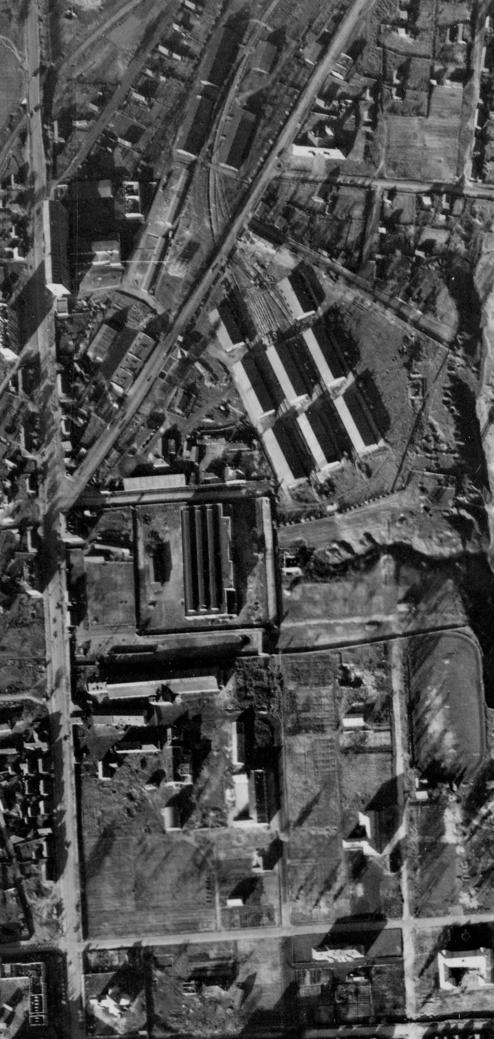 Магілёў. Нямецкі аэрафотаздымак